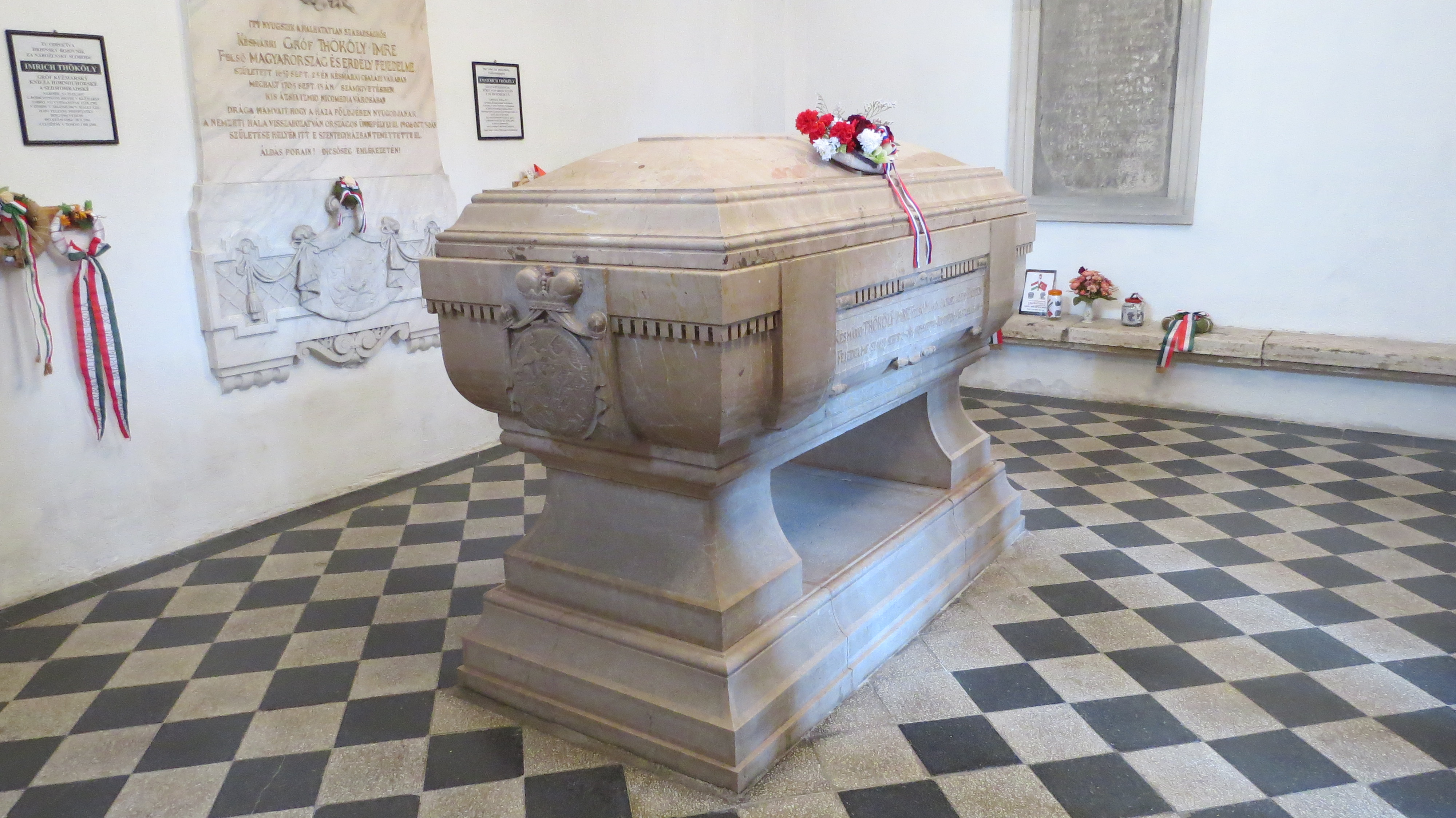 Sarkofag Emerika_Thökölyja v tako imenovani novi cerkvi v Kežmaroku, Slovaška